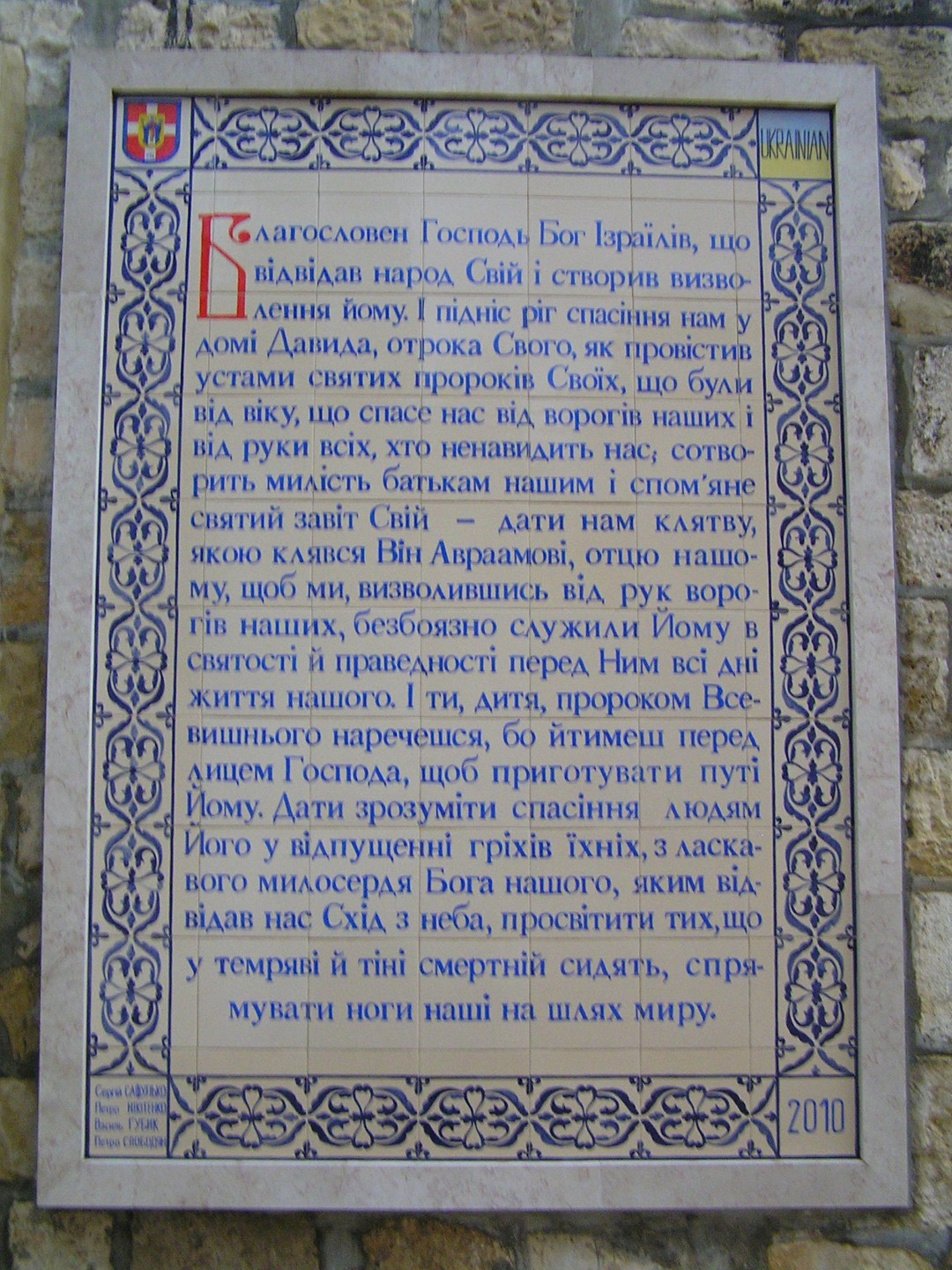 Церква Івана Хрестителя: Церква святого Івана Хрестителя (Єрусалим)